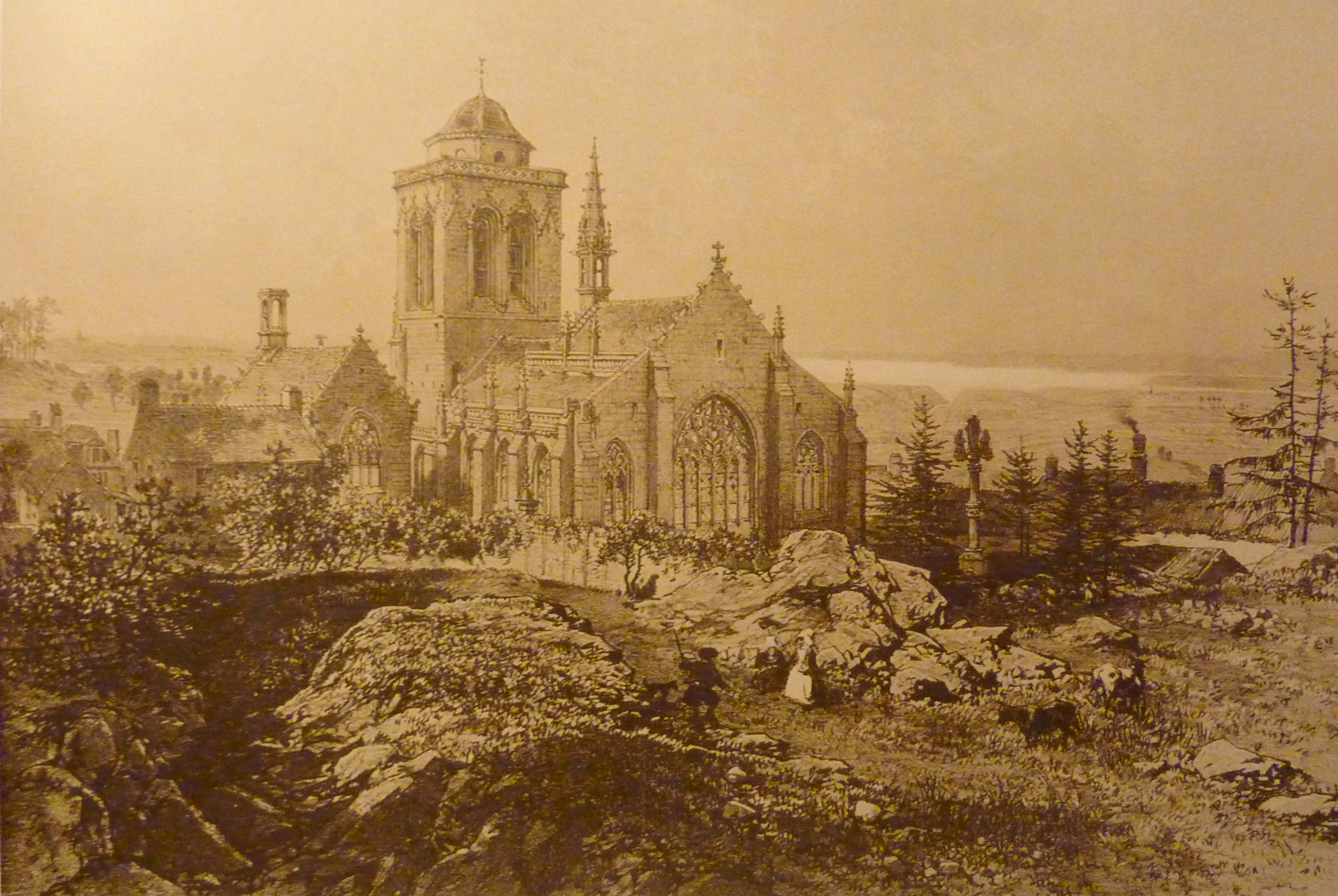 Félix Benoist (1818-1896) : L'église de Locronan (lithographie, 1865, La Bretagne contemporaine, Henri Charpentier, Nantes